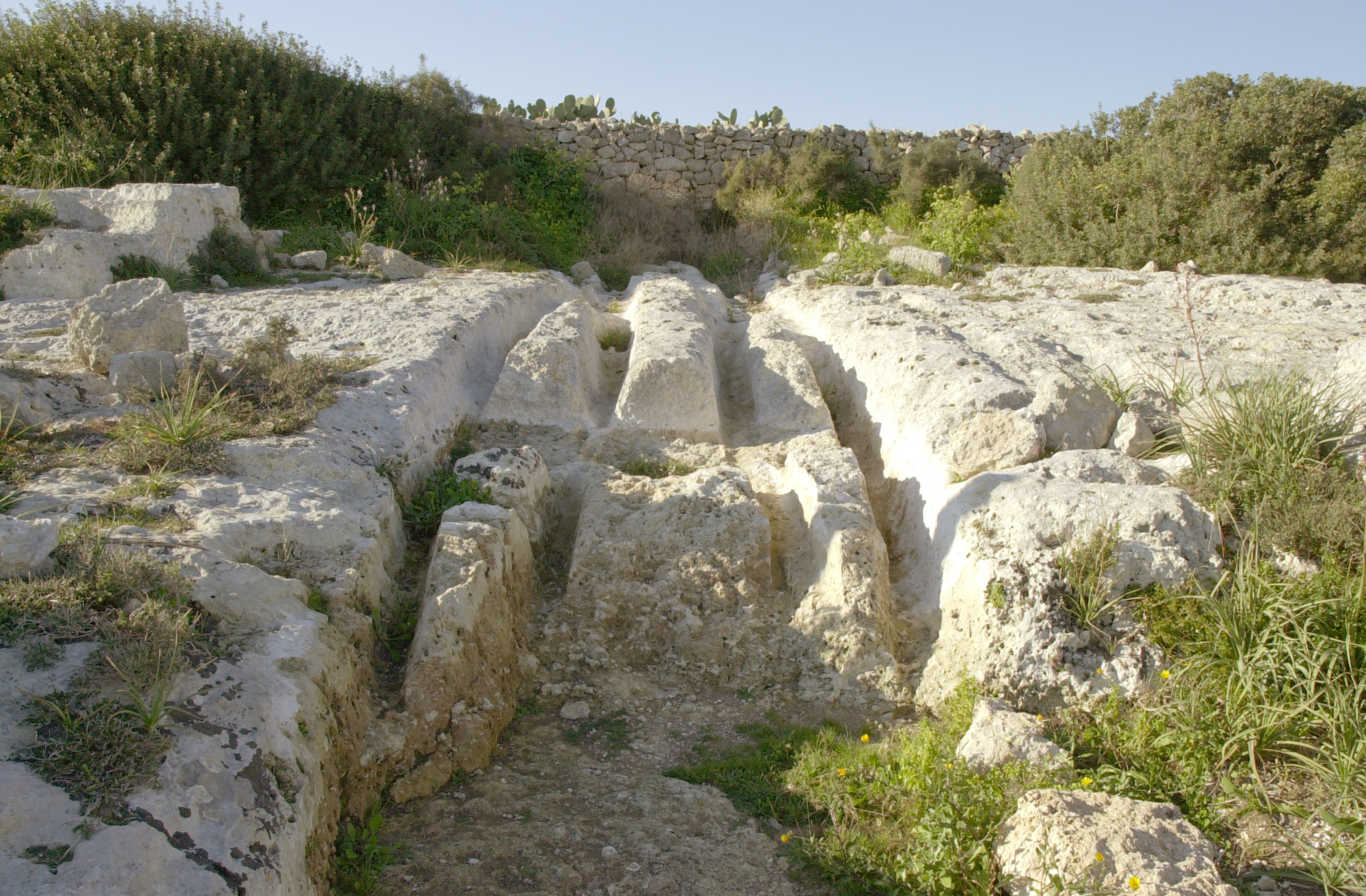 Cart Ruts auf Malta auf freiem Gelände in der Nähe von Clapham Junction, Dingli